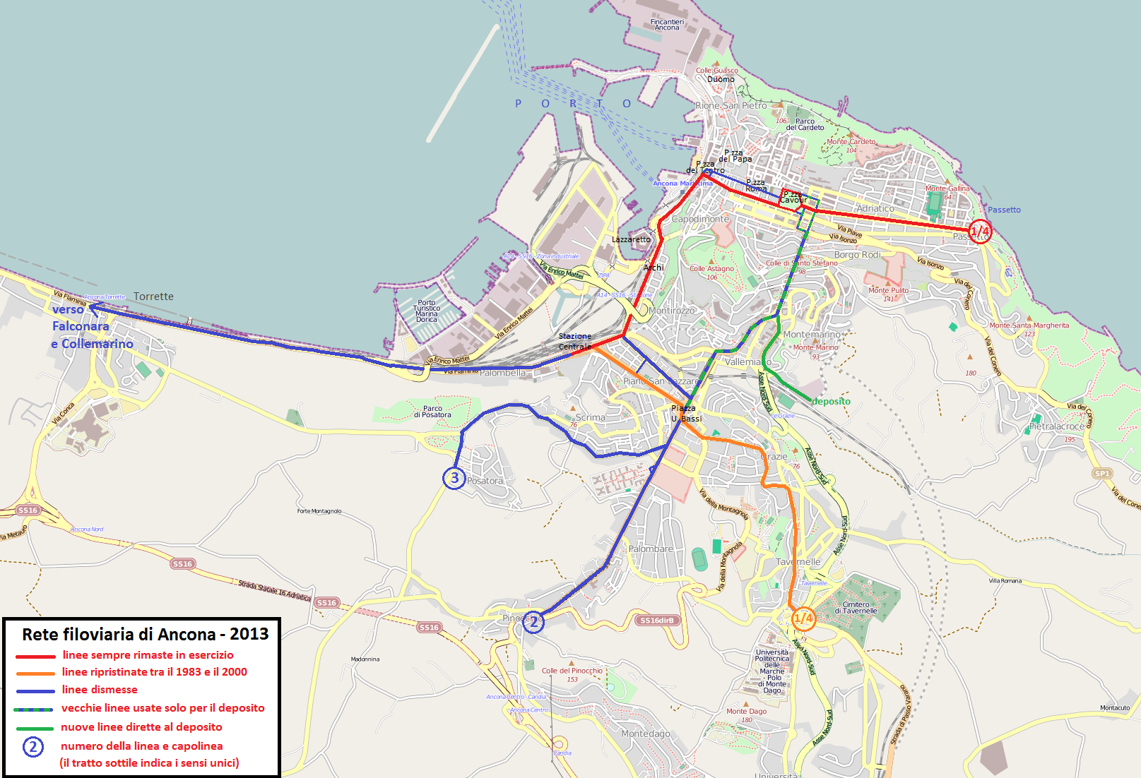 Mappa della rete filoviaria di Ancona, con le linee attive, quelle dismesse, quelle nuove, quelle ripristinate dopo dismissione. Nella mappa è segnato anche il capolinea originario della linea "1", prima del prolungamento degli anni '80 fino a piazza U. Bassi. È segnato anche il capolinea originario della linea 4, ora effettuato dalla linea 1/4.